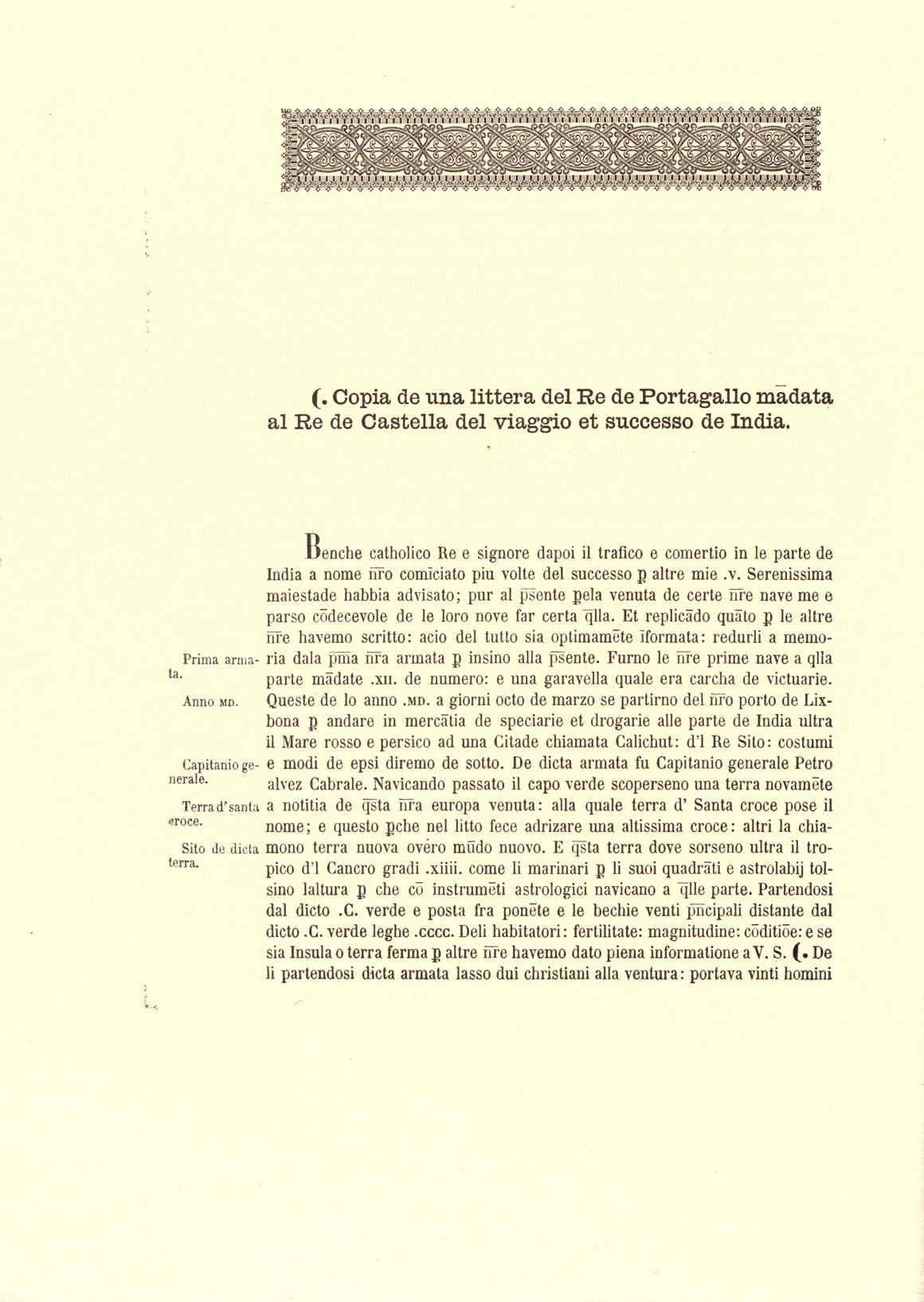 Copia de una carta del rey de Portugal enviada al rey de Castilla, sobre el viaje a la India. El presente es un importante documento en la historiografía del país, y el primer texto impreso que se refiere exclusivamente al descubrimiento de Brasil, incluido en un panfleto anónimo escrito en italiano, "Copia de una littera del Re de Portogallo madata al Re de Castella del viaggio & sucesso de India", y publicado inicialmente en Roma, el 23 de octubre de 1505, por João de Basicken. "Recuerda William Brooks Greenlee que 'la autenticidad de esta carta es contestable, pero es el más antiguo relato impreso del viaje de Cabral hoy existente'. A pesar de lo dicho, como ya resaltó Rubens Borba de Moraes, 'para los brasileños este panfleto guarda gran interés, visto que contiene las primeras noticias impresas del descubrimiento de Brasil por parte del "Capitán General Petro Alves Cabrale..."